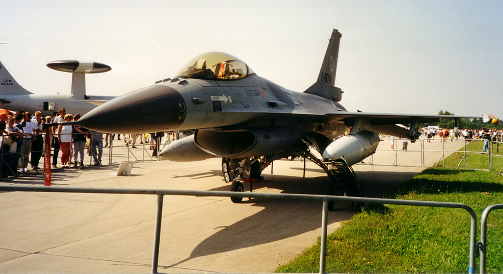 Beschreibung: F-16 Fighting Falcon in Laage